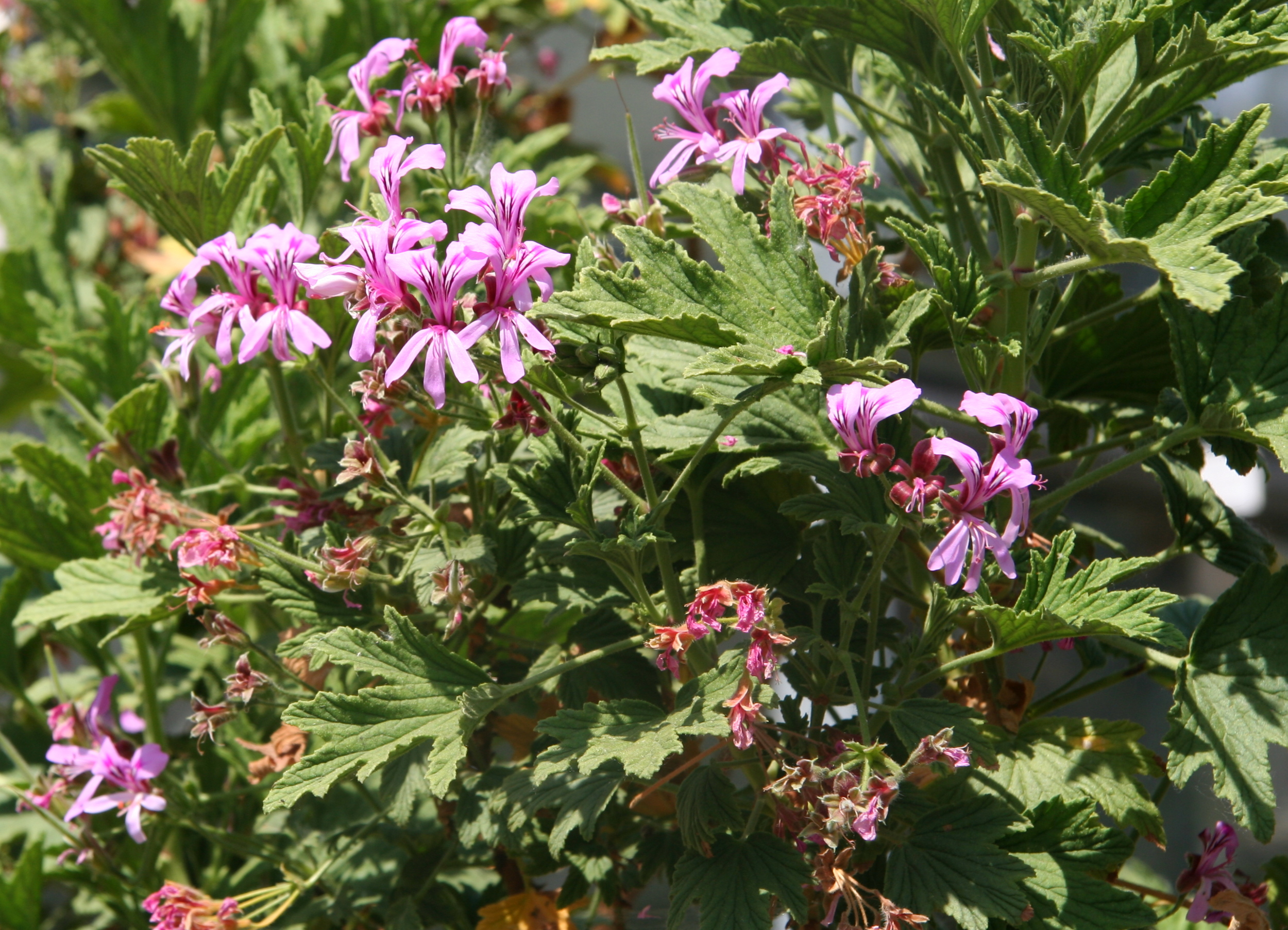 Pelargonium scabrum im Botanischen Garten Dresden